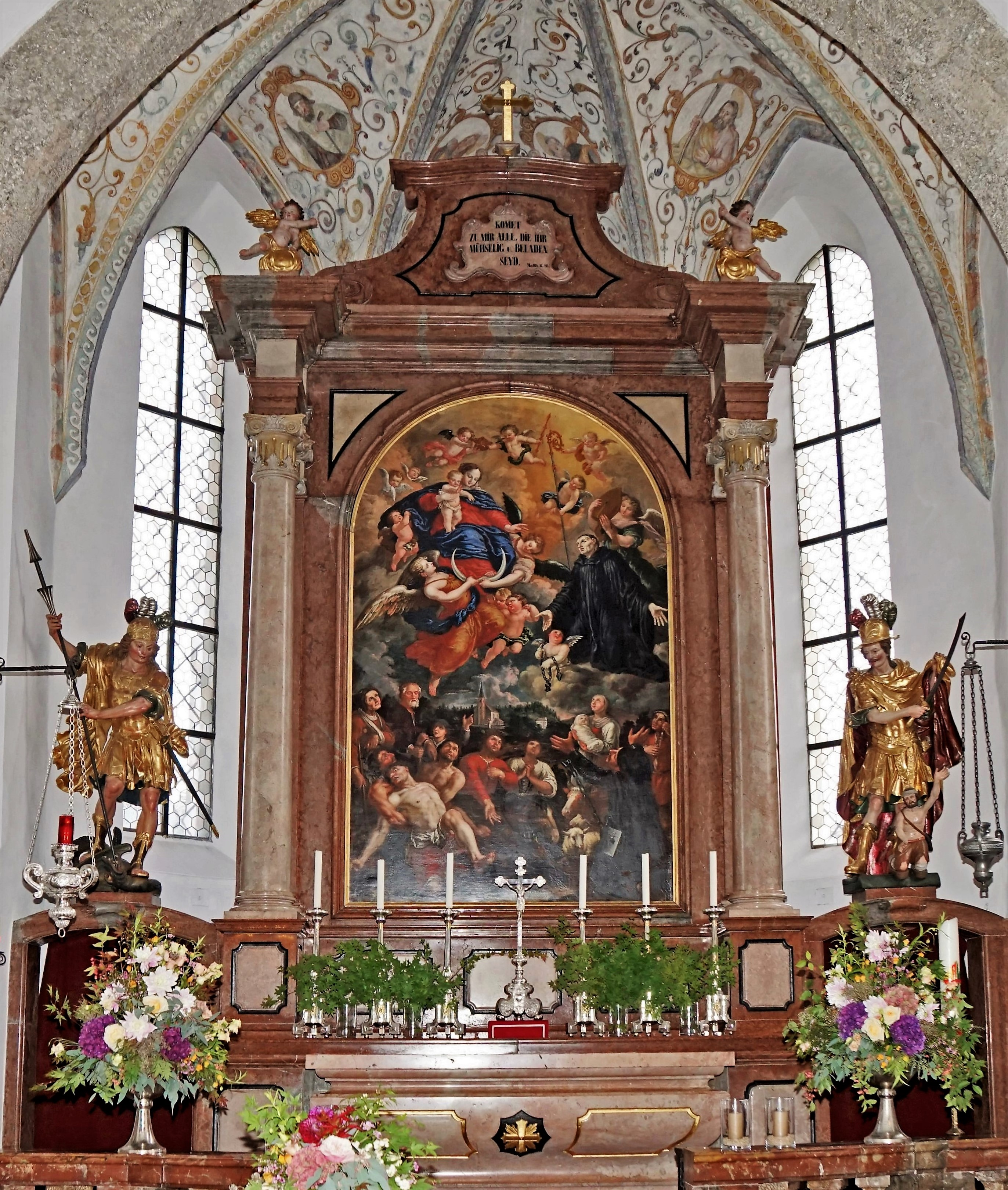 Wallfahrtskirche St. Leonhard (Grödig), Hochaltar mit Darstellung des hl. Leonhard vor Maria mit Kind